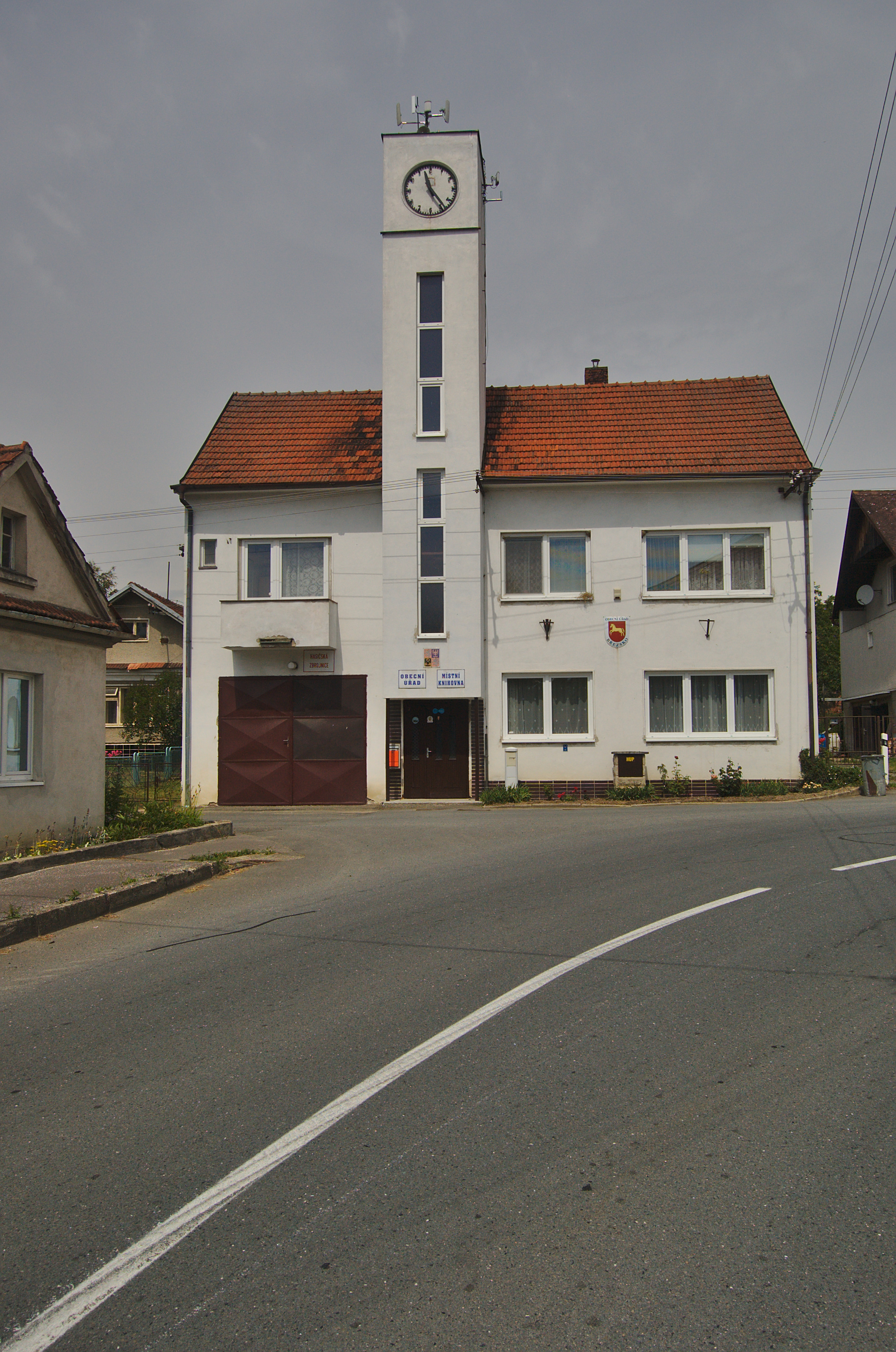 Obecní úřad, Březsko, okres Prostějov